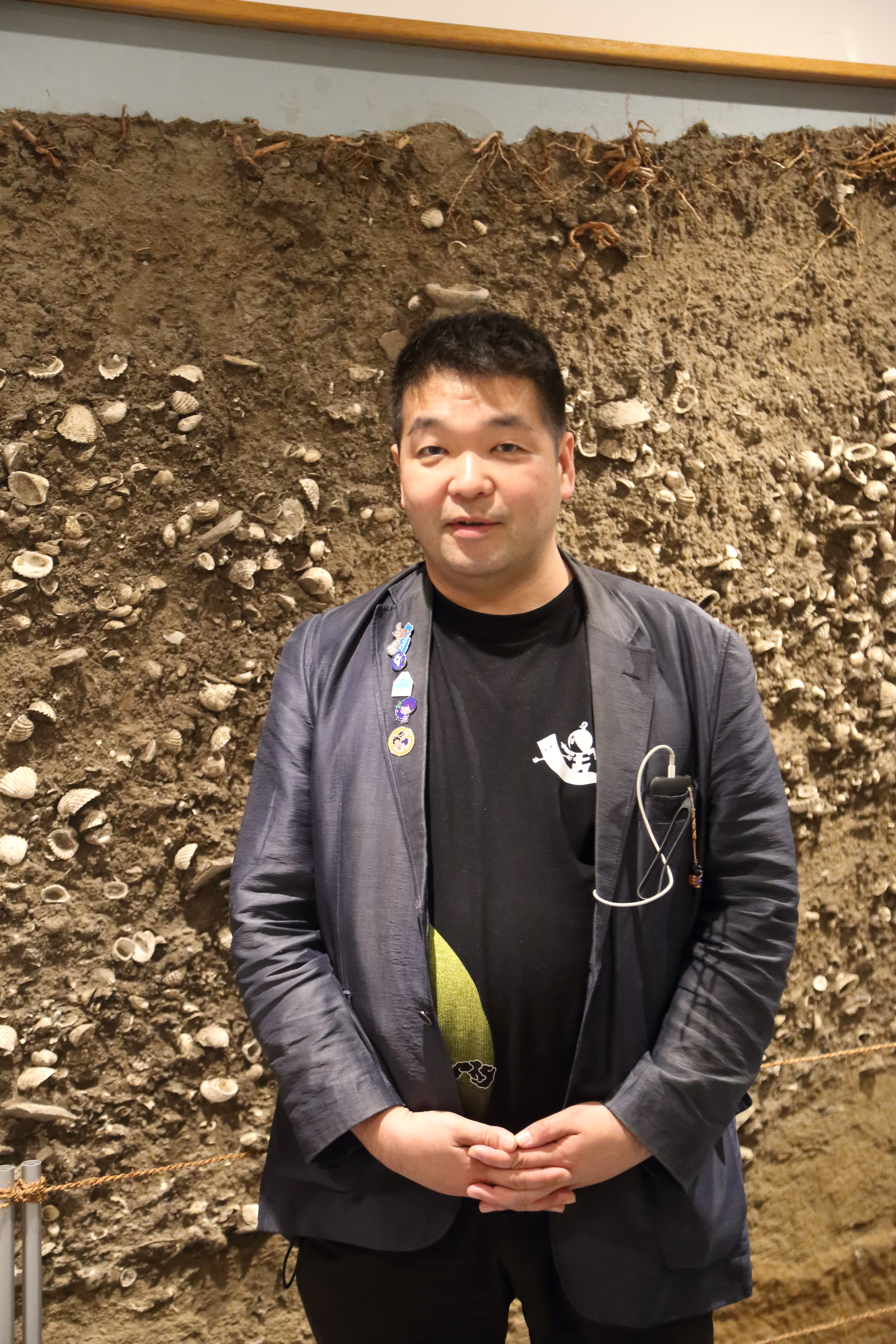 岡本真氏。